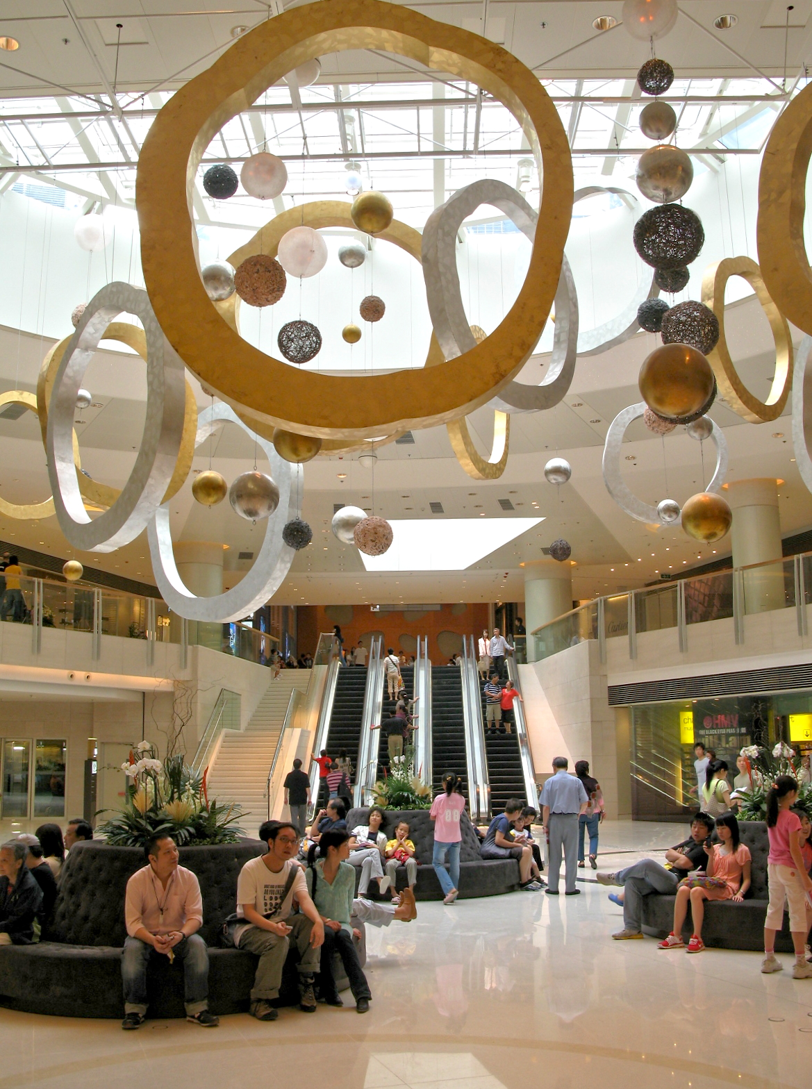 HK Elements VOID